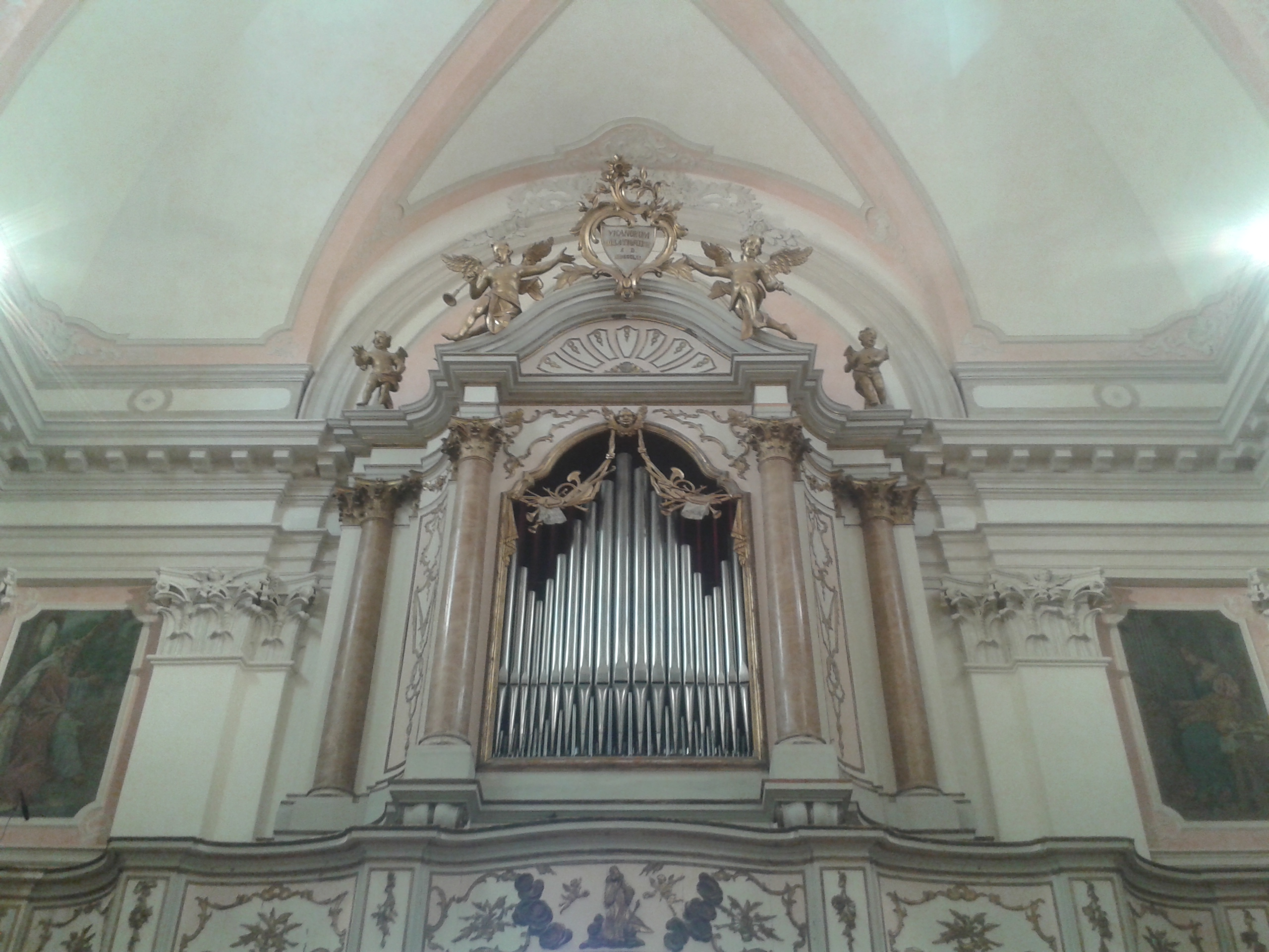 Organo della Chiesa San Benetetto Abate in Scorzè